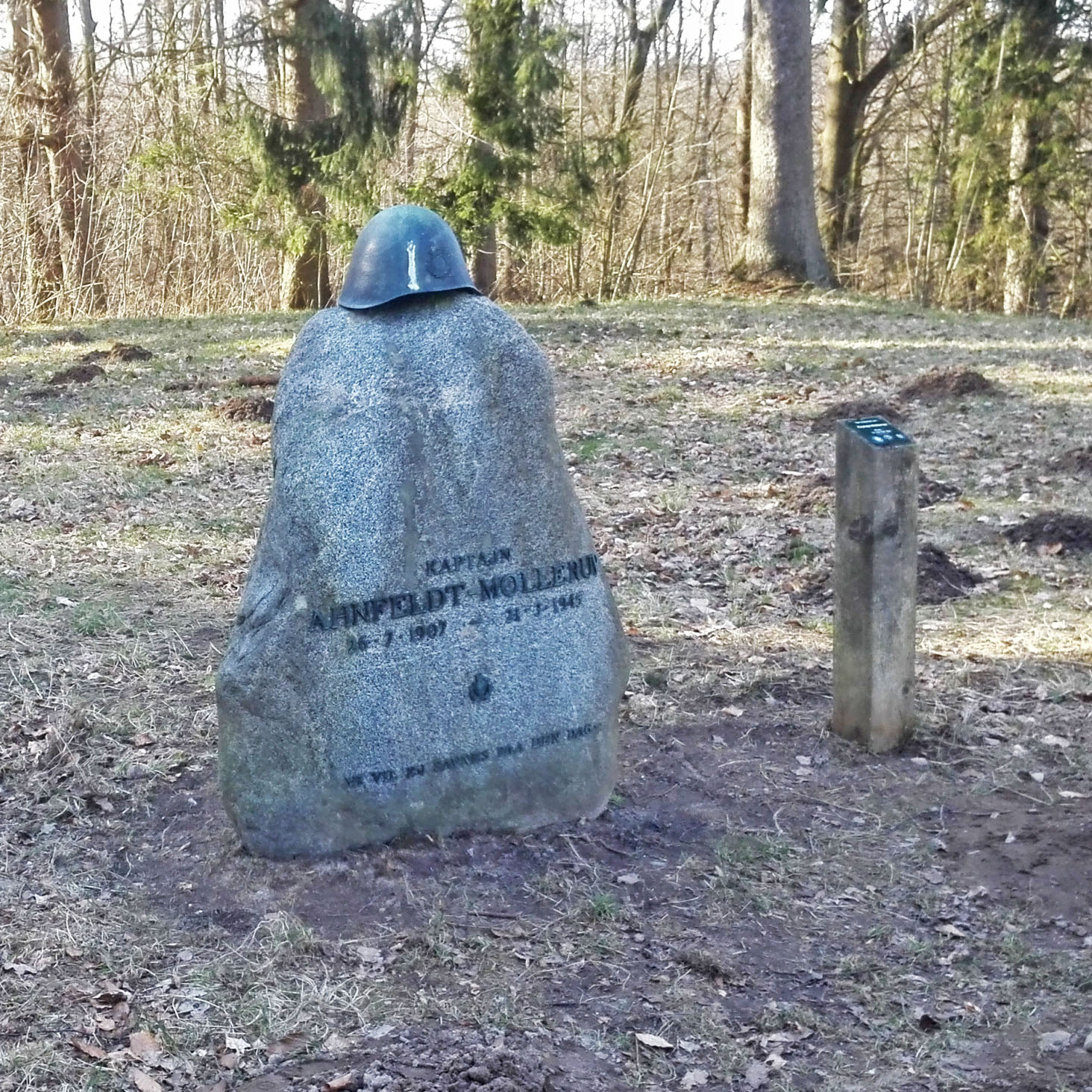 Mindesten for kaptejn Ahnfeldt-Mollerup på Høje Sandbjerget.